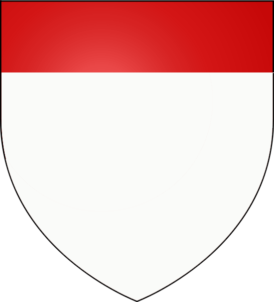 Герб королевства Фессалоники